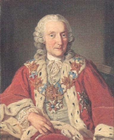 Porträtt av riksrådet Otto Fleming iklädd riksrådsdräkt, bärandes runt halsen riddarkedjorna för serafimerorden och nordstjärneorden. Han bär även dessa ordnars kraschaner. Porträtt från ca 1760 av Lorens Pasch d.y.